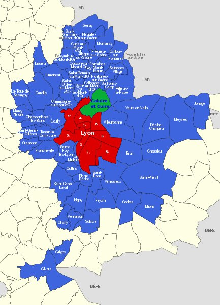 Situation de Caluire et Cuire parmi la communauté urbaine du Grand Lyon